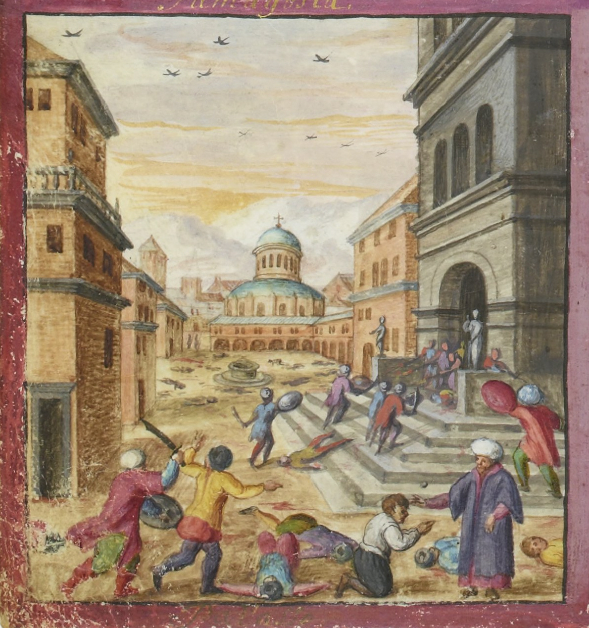 Voyages et aventures de Ch. Magius, Bibliothèque nationale de France, département Estampes et photographie, RESERVE 4-AD-134, detail de la miniature no. 12; sac de la ville et du palais